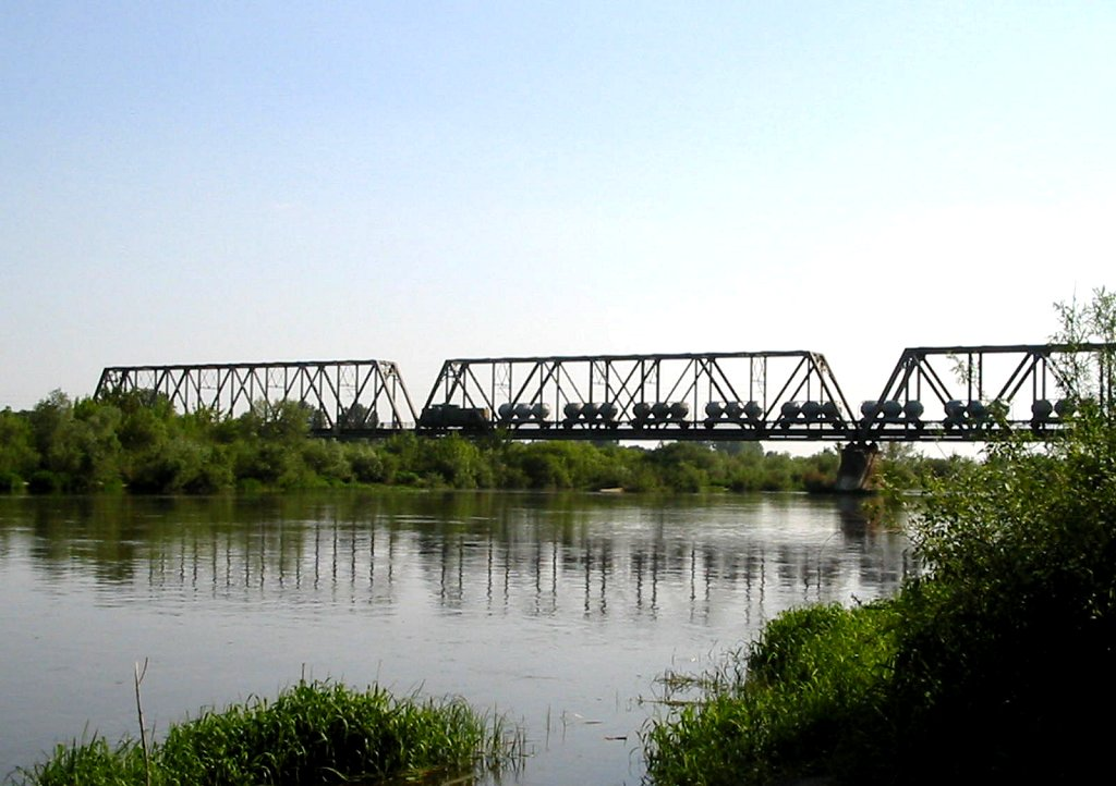 Wyszków - most kolejowy na rzece Bug